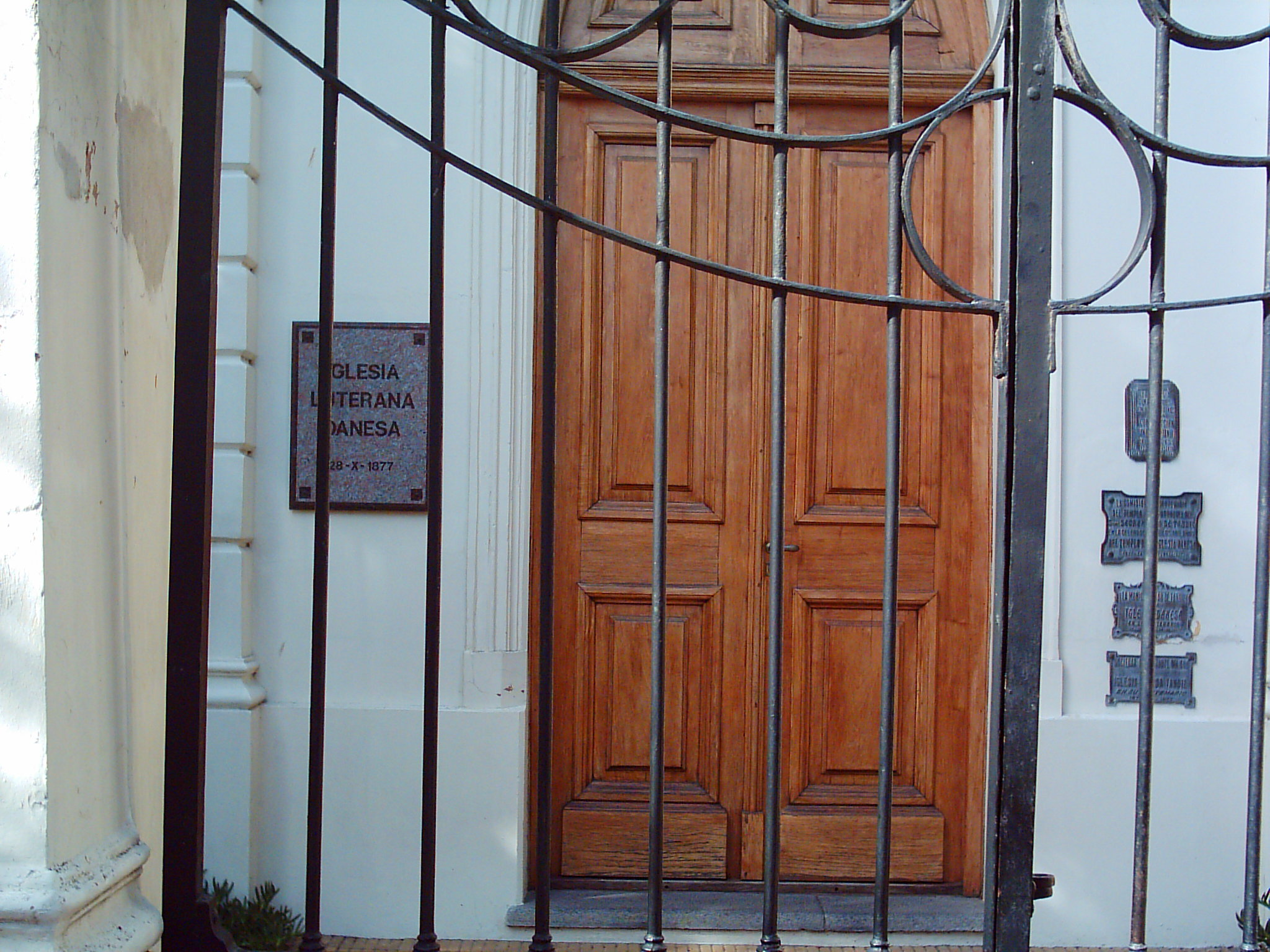 Entrada de la Iglesia dinamarquesa de Tandil